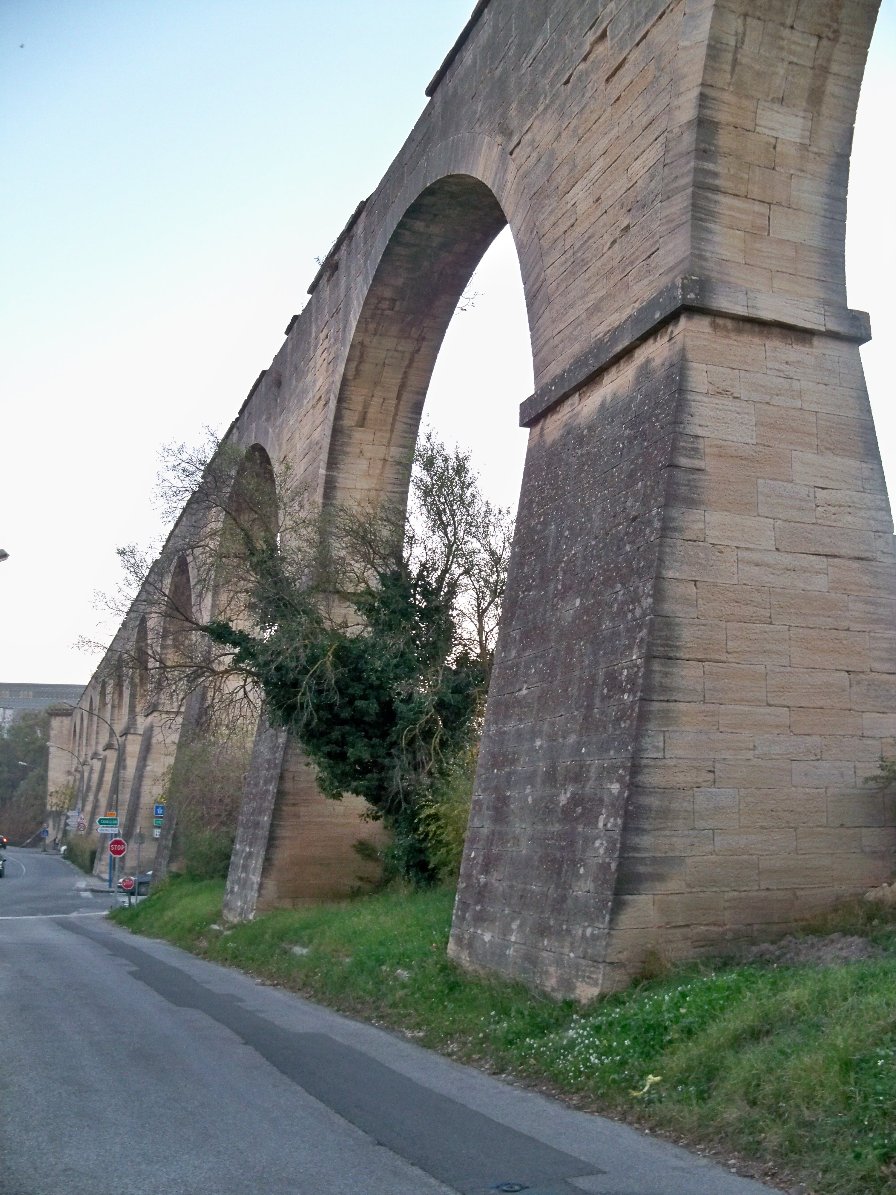 Aqueduc du canal de Carpentras, à Carpentras (Vaucluse, France)